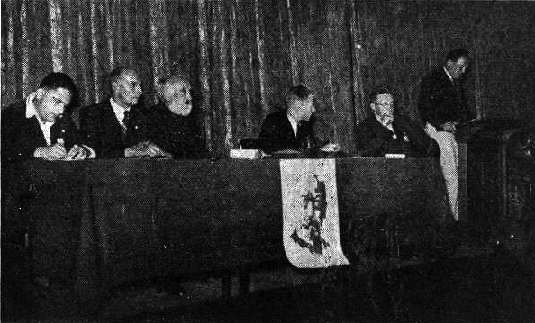 Ĉe la estrara tablo okaze de la Solena Malfermo. — De dekstre maldekstren: (sur la tribuno) K-do Bas Vels, prez. O.K.K.; Faulhaber, prez. F.L.E.; v. Essen, sekret. O.K.K.; Dreves Uiterdijk, veterano de la movado; v. d. Pols, kasisto O.K.K.; Bartelmes, ĝen. sekretario de SAT.